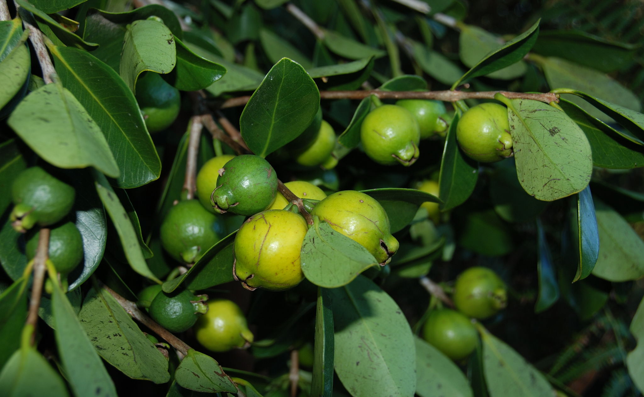 goyaviers blancs